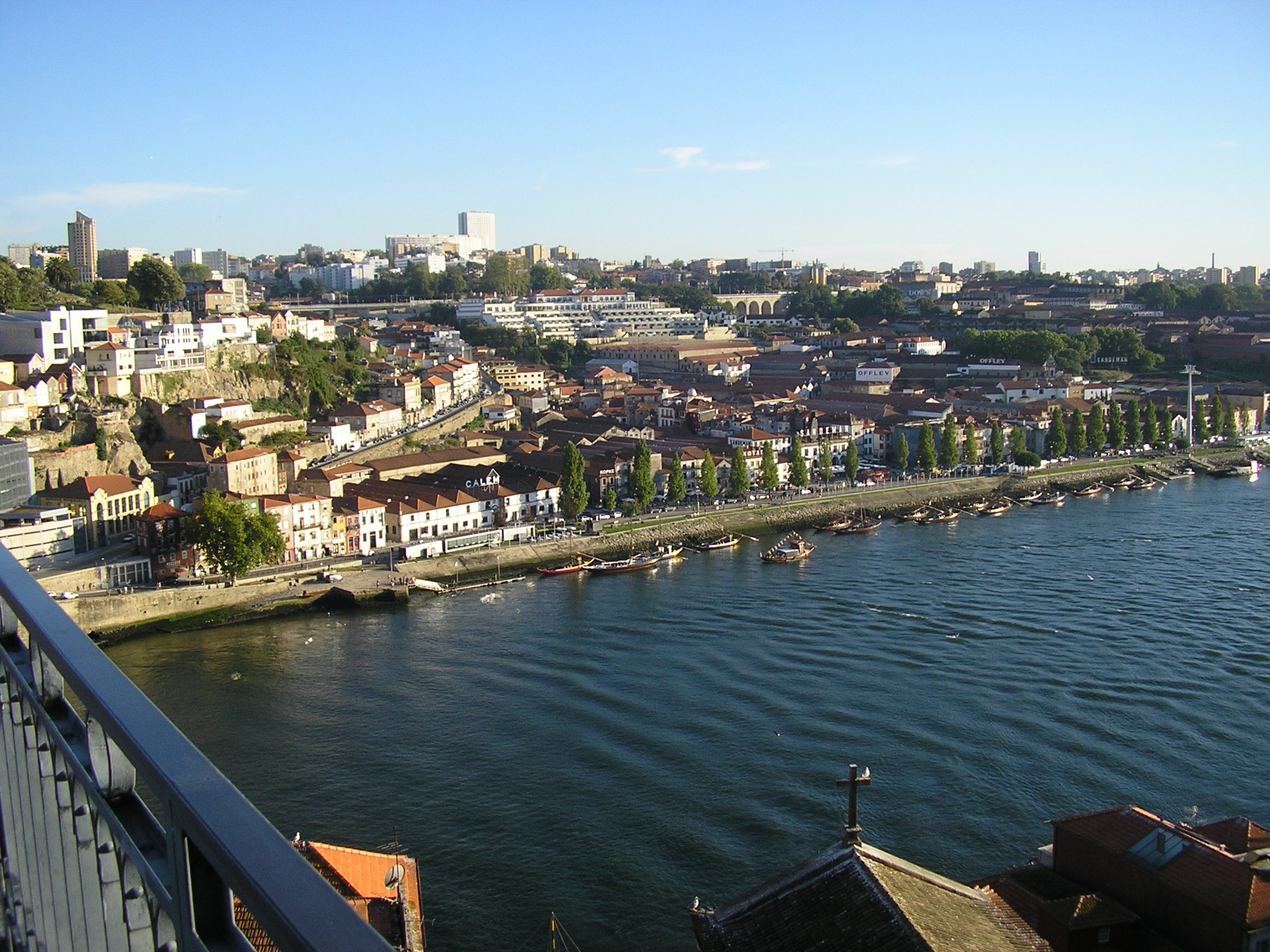 Vila Nova de Gaia from Porto